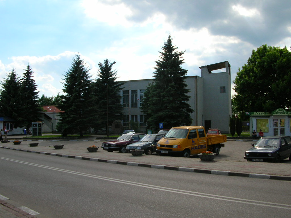 Krajenka - Krajeński Ośrodek Kultury Autor - Bartek Wawraszko